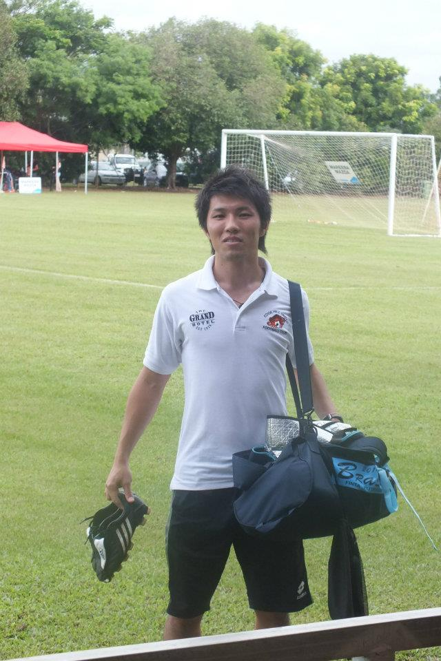 岩田卓也2012